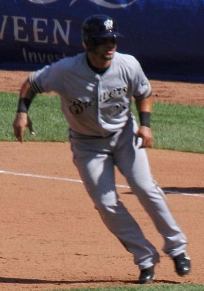 Gerardo Parra